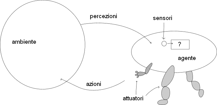 Immagine che descrive concettualmente l'interazione tra agente intelligente e ambiente esterno. È analoga alla Figura 2.1 di Stuart J. Russell, Peter Norvig, Intelligenza artificiale. Un approccio moderno, Prentice Hall International